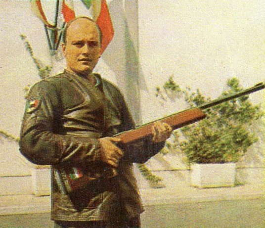 MUNCHEN/MONACO '72-PANINI-Figurina n.174- DONNA - ITALIA -TIRO-Rec